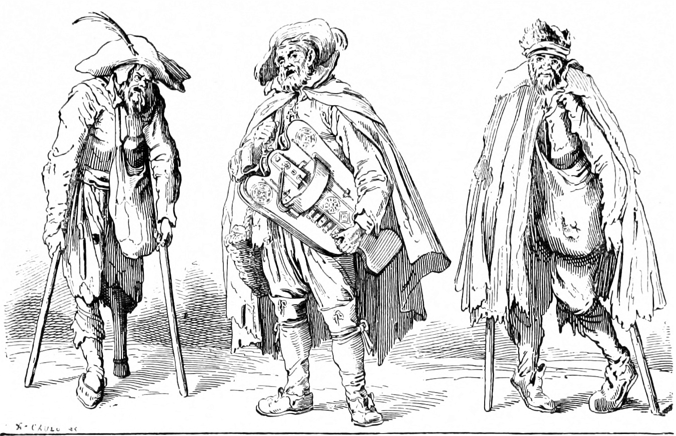 Musicien de rue entouré de deux estropiés avec des béquilles, dont un cul-de-jatte avec une jambe de bois.